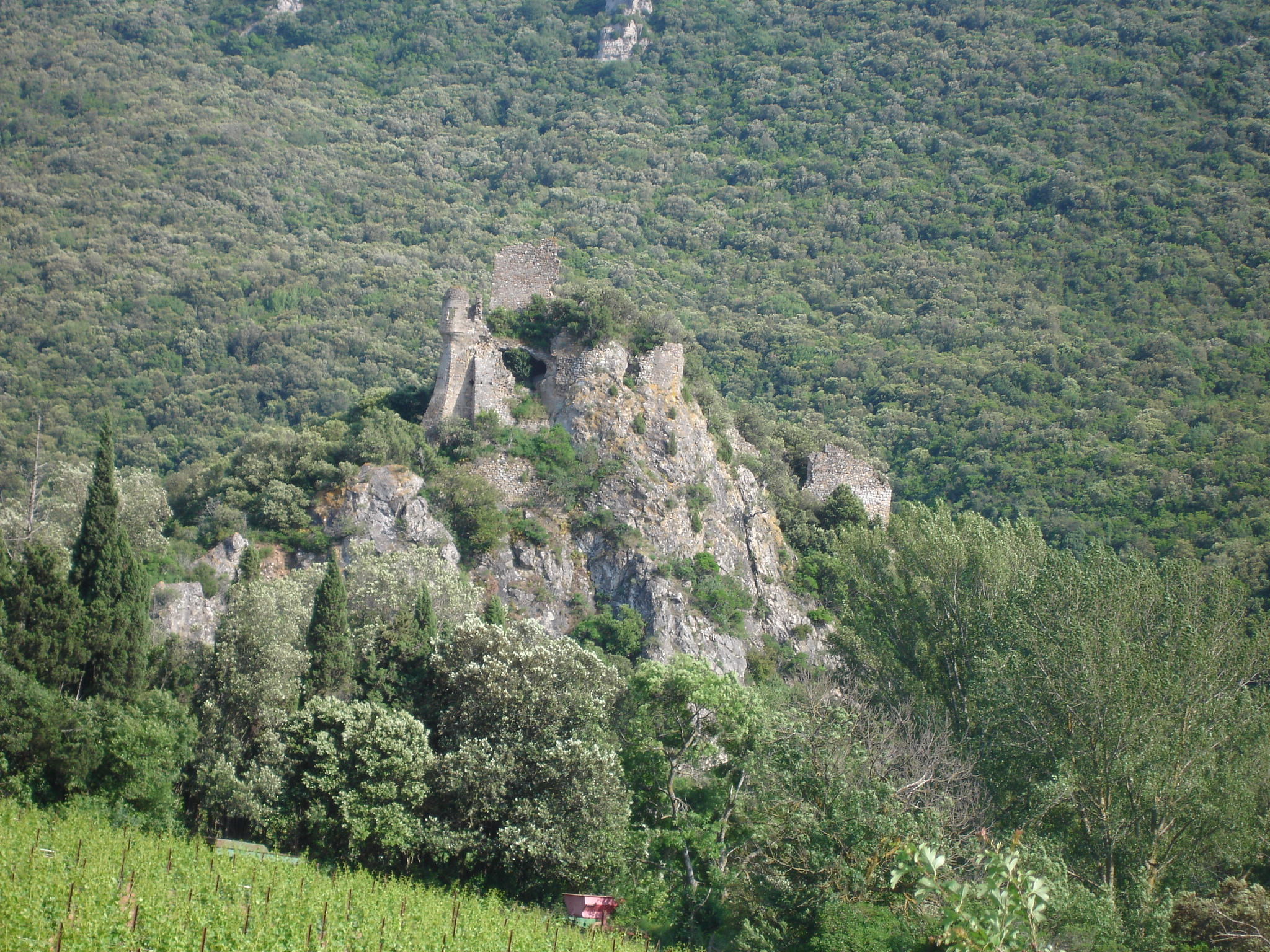 France, Aude (11), Château de Durfort